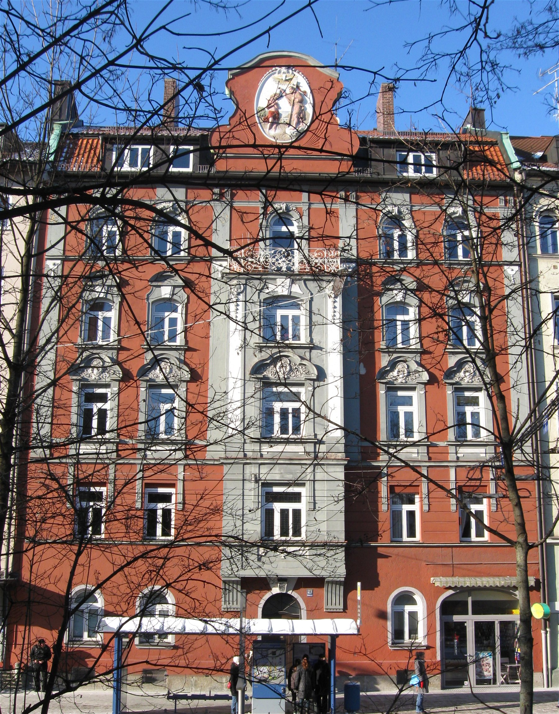 Johannisplatz 23; Mietshaus, neubarock, mit Erker und Giebelrelief, um 1900